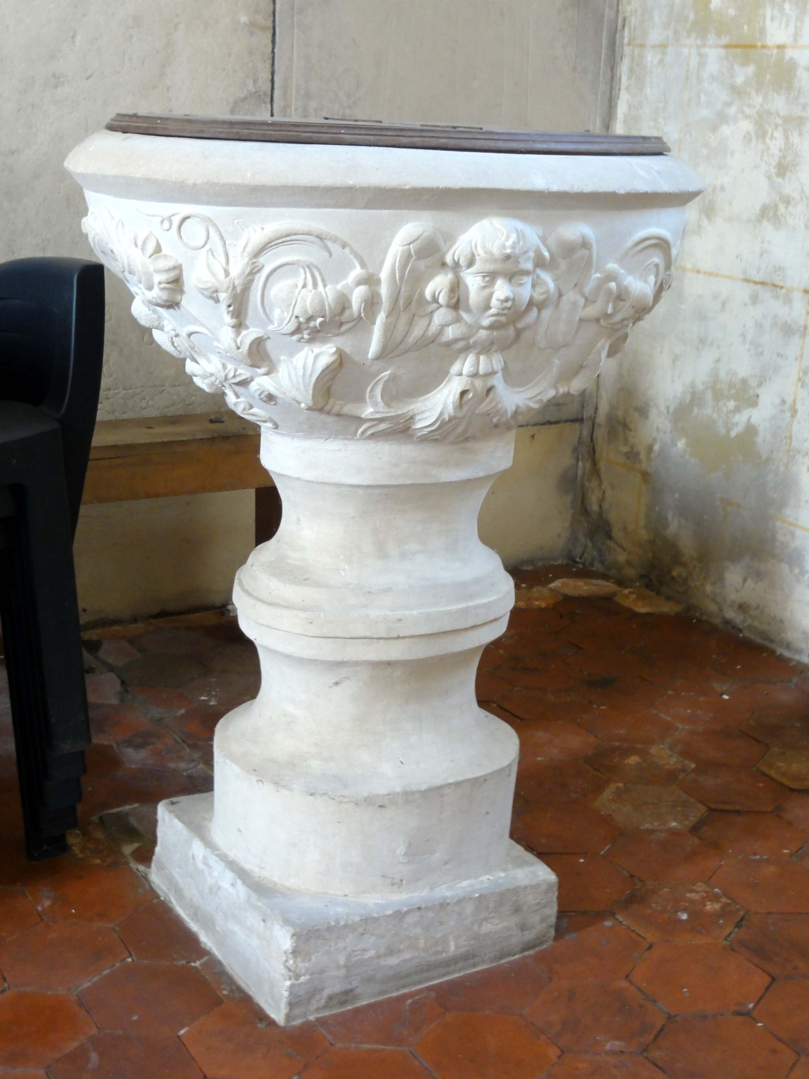 Les fonts baptismaux du XVIIe siècle.